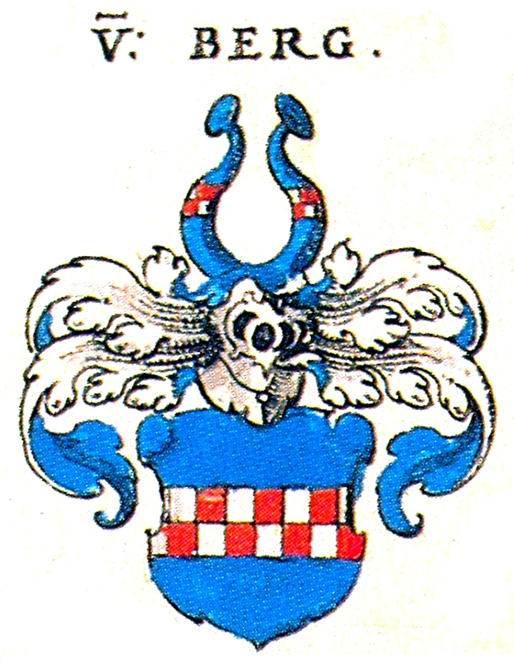 Ritterschaft und Adel in Franken von Berg